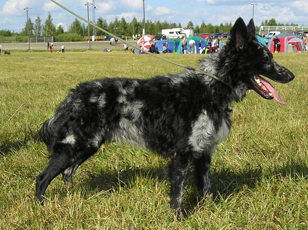 Mudimale Kökényfia Cimer, blue merle colour